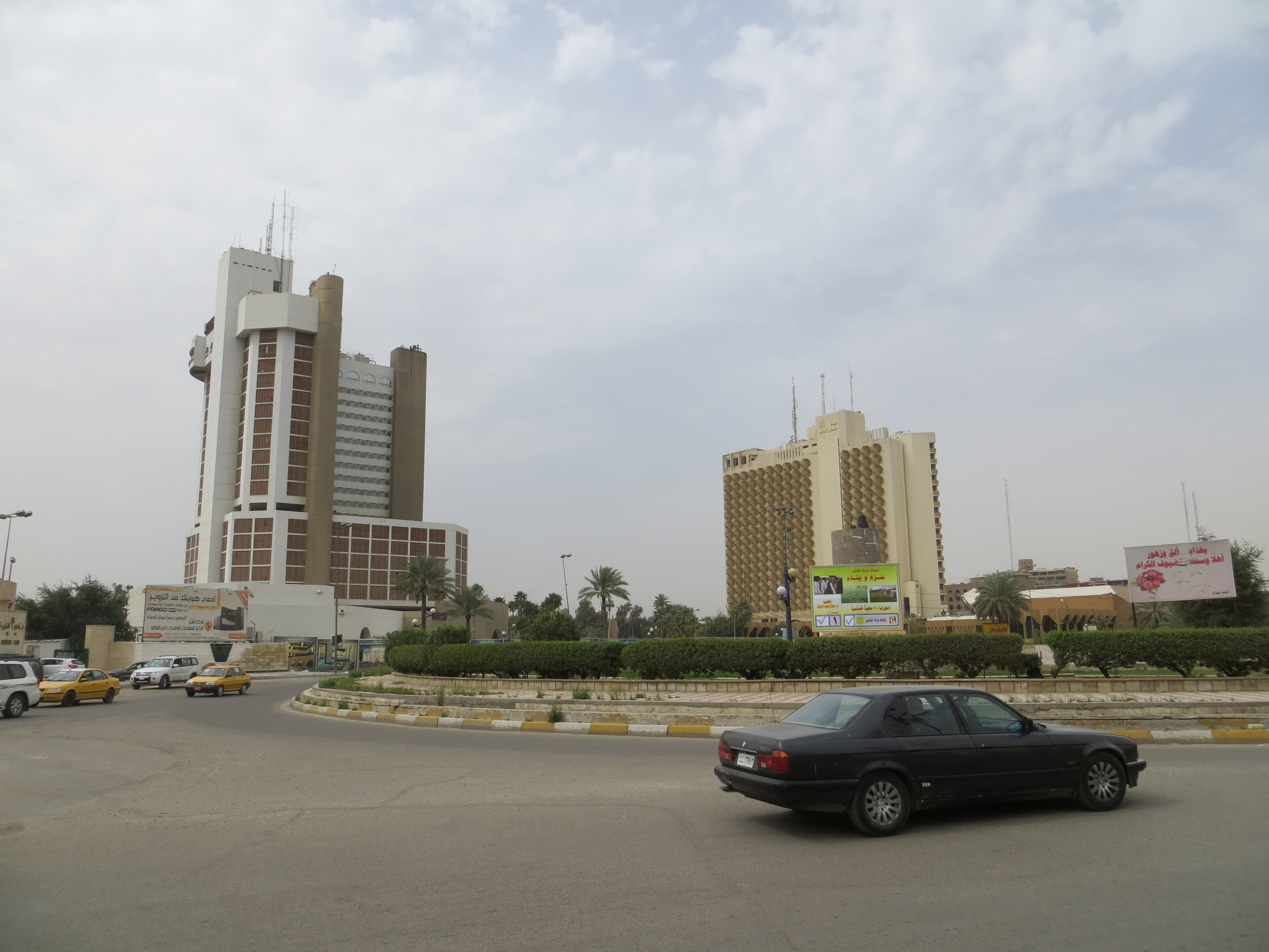 Baghdad, 2013